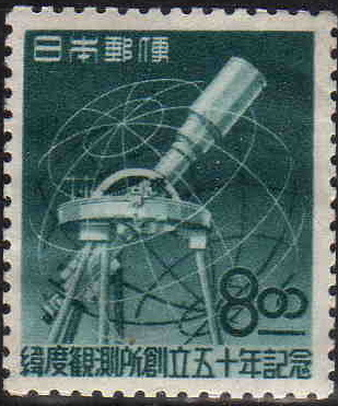 日本で軽度観測所設立50周年を記念した郵便切手